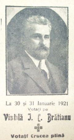 Afişul electoral a lui Vintilă Brătianu la alegerile din 1921